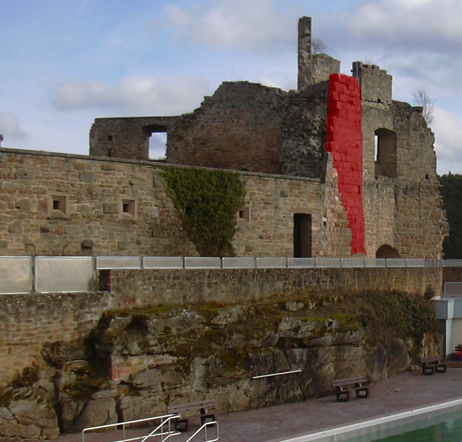 Burg Altleiningen: Der Rest der staufischen Schildmauer ist rot eingefärbt